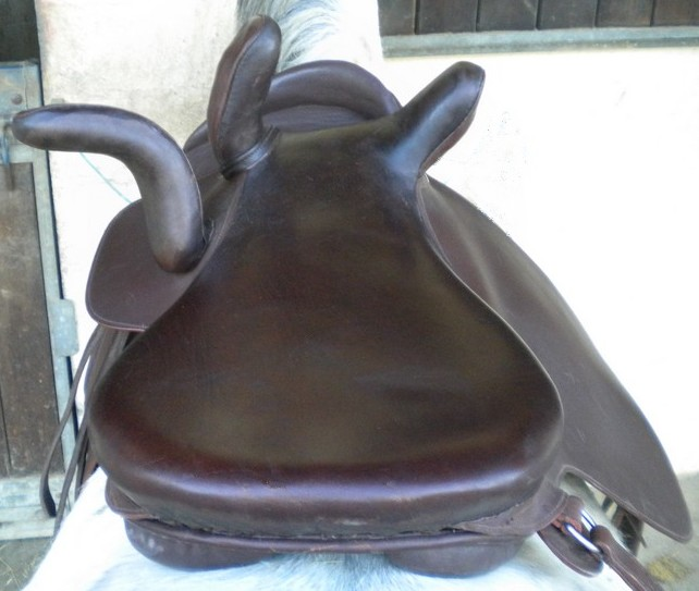 Selle d'amazone à 3 fourches, modèle contemporain Durandal